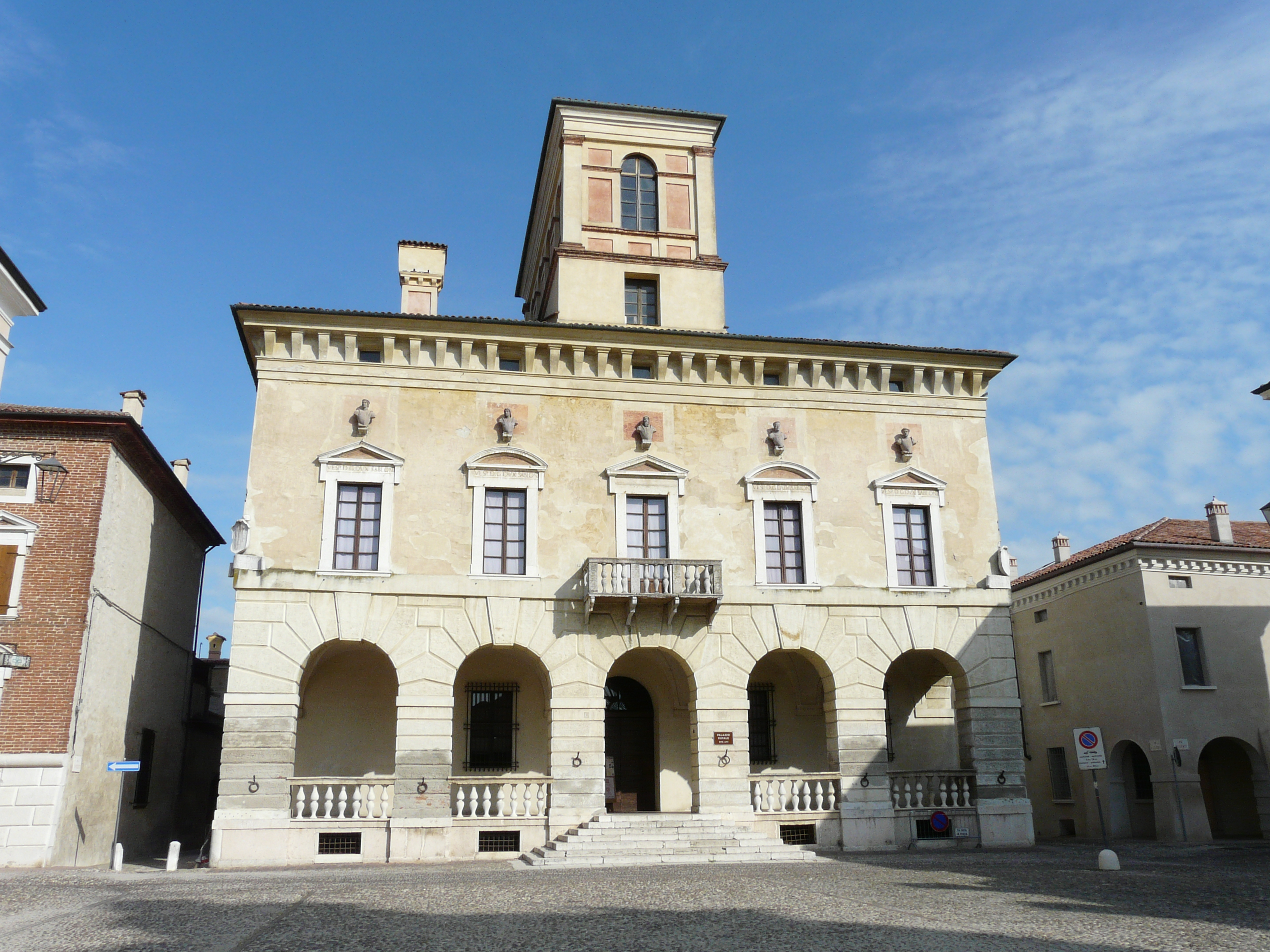 Palazzo Ducale, Sabbioneta, Lombardia, Italia